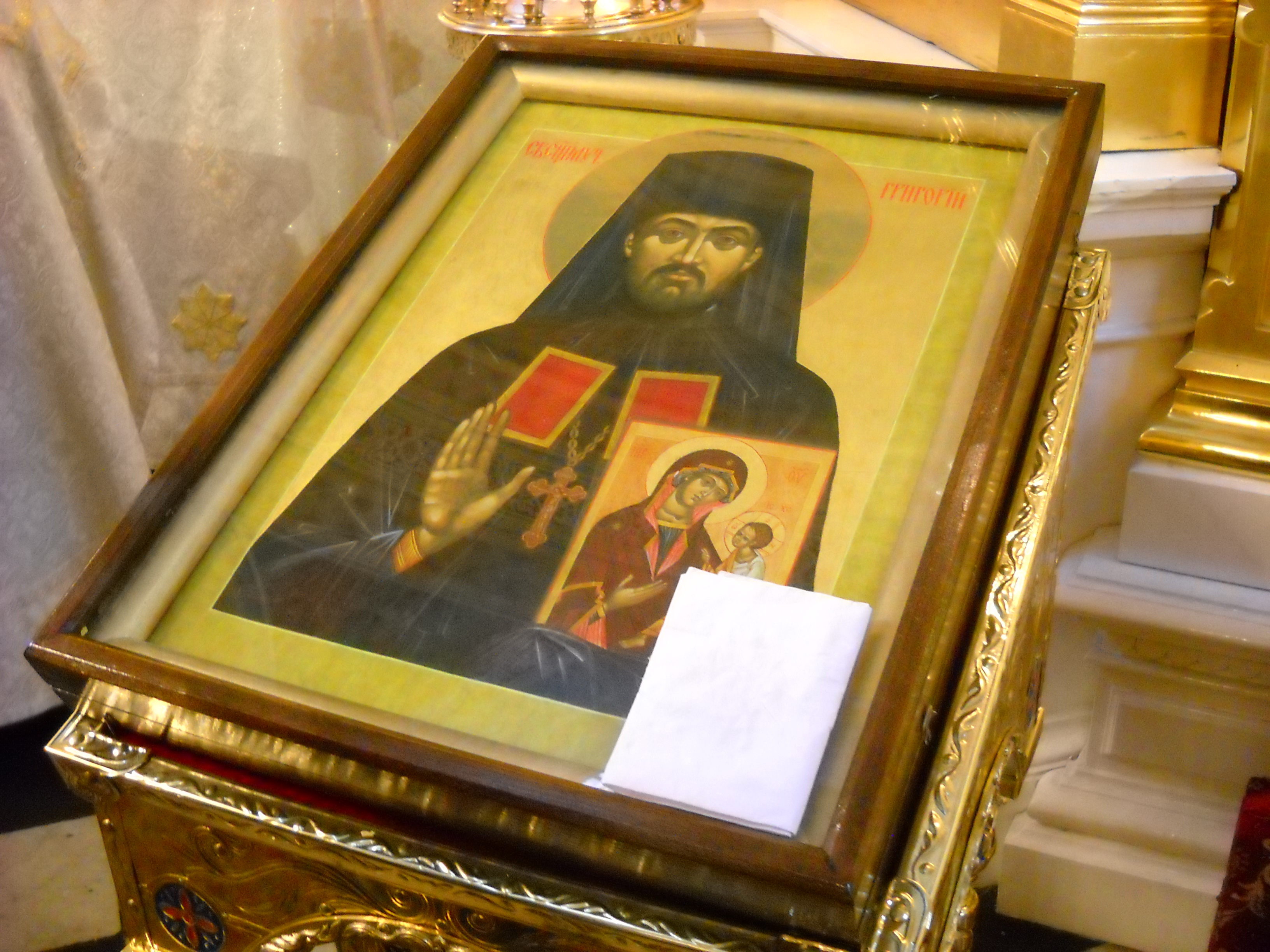 Ikona św. męczennika archimandryty Grzegorza Peradze w soborze św. Marii Magdaleny w Warszawie.